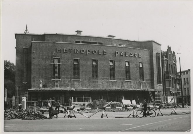 Carnegielaan, het nieuwe bioscooptheater 'Metropole Palace'